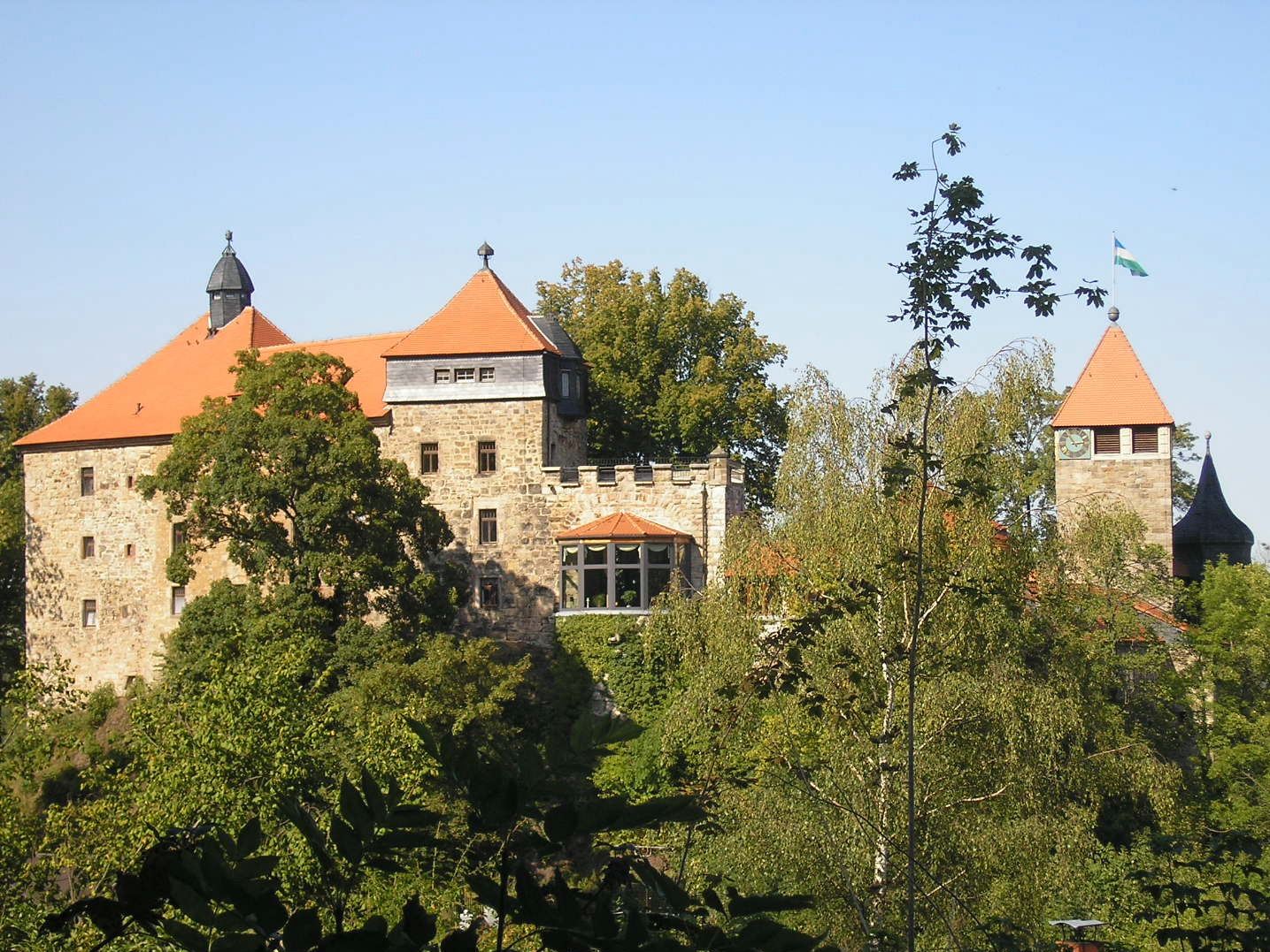 Das Schloss Elgersburg in Elgersburg bei Ilmenau (Thüringen, Deutschland).